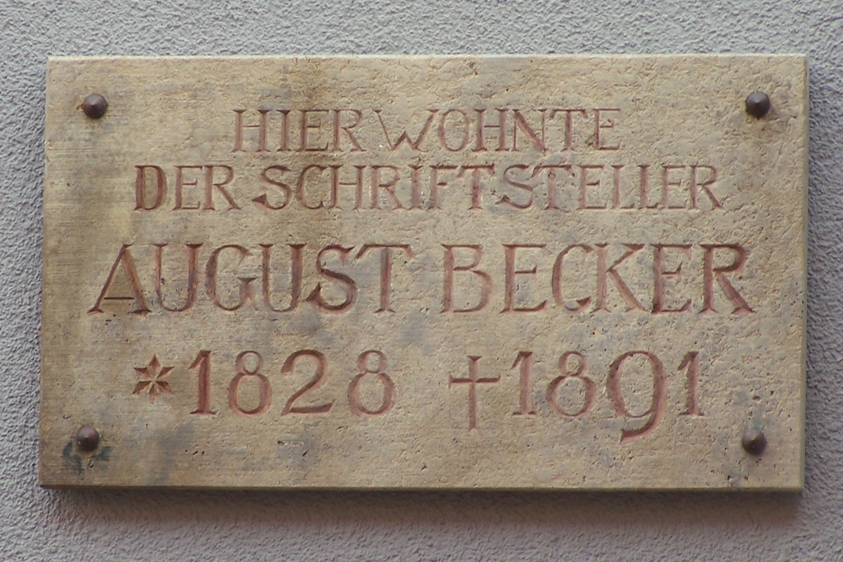 Die Gedenktafel für den Schriftsteller August Becker, der in Eisenach viele Jahre seines Lebens verbrachte.